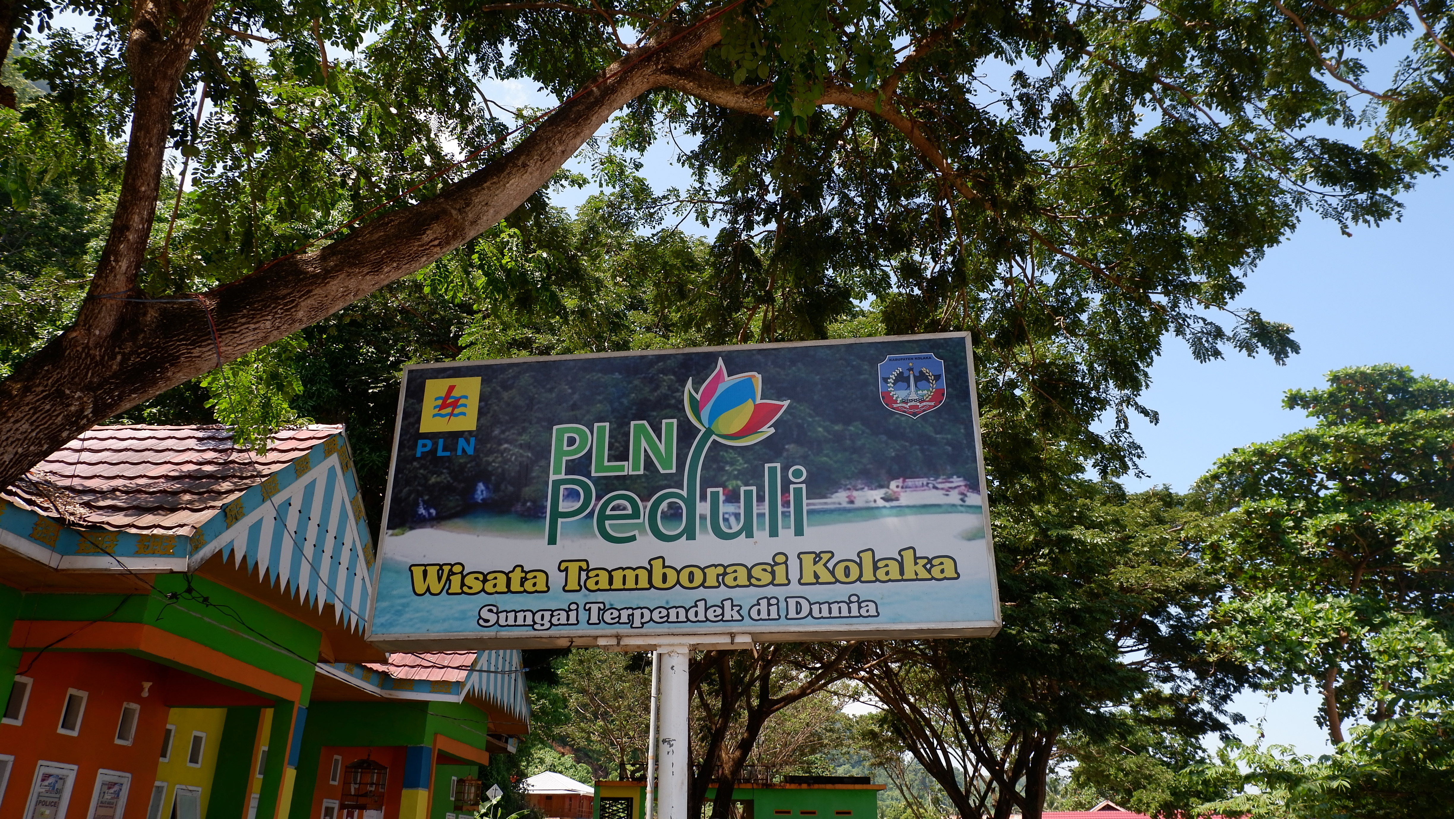 Program PLN Peduli terhadap pengembangan objek wisata Sungai Tamborasi di Kolaka